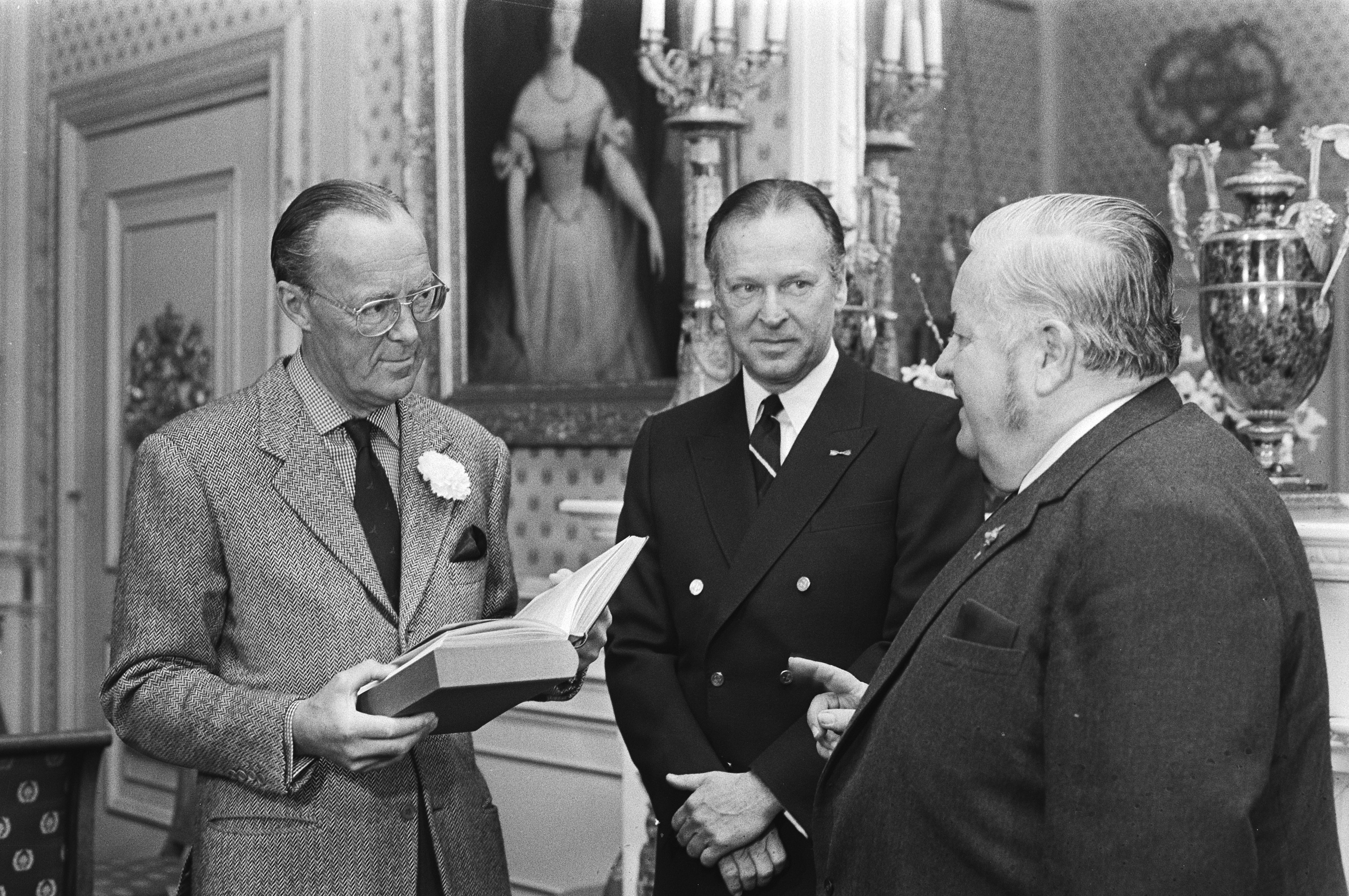 Collectie / Archief : Fotocollectie Anefo Reportage / Serie : Prins Bernhard ontvangt op paleis Soestdijk het boek van Erik Hazelhoff Beschrijving : V.l.n.r. prins Bernhard, Hazelhoff Roelfzema en uitgever Stok Datum : 31 maart 1971 Locatie : Soestdijk, Utrecht (prov.) Trefwoorden : boeken, ontvangsten, prinsen, uitgevers Persoonsnaam : Bernhard (prins Nederland), Hazelhoff Roelfzema, Erik, Stok, Ad M.C. Fotograaf : Fotograaf Onbekend / Anefo Auteursrechthebbende : Nationaal Archief Materiaalsoort : Negatief (zwart/wit) Nummer archiefinventaris : bekijk toegang 2.24.01.05 Bestanddeelnummer : 924-4116